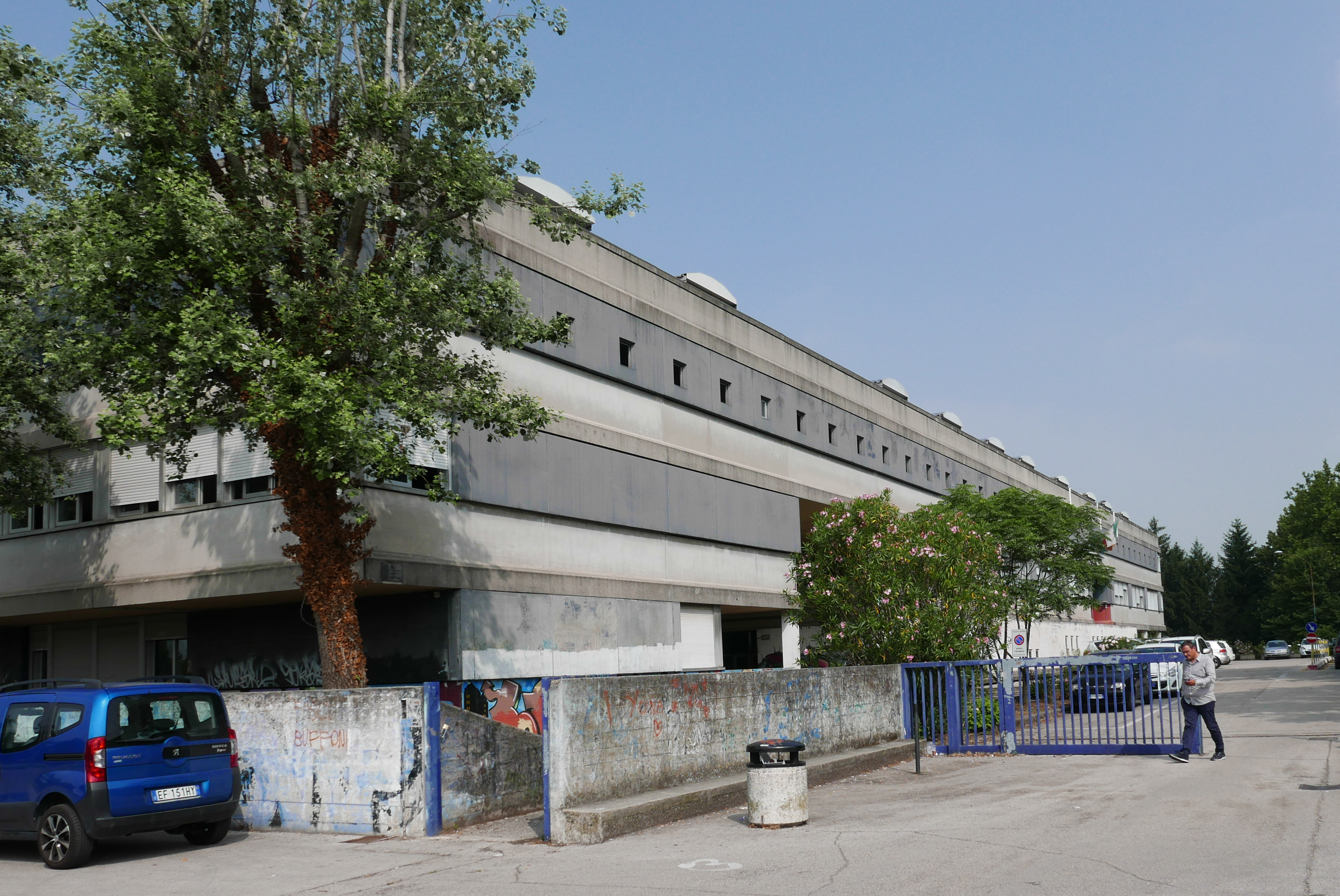 Istituto Canova